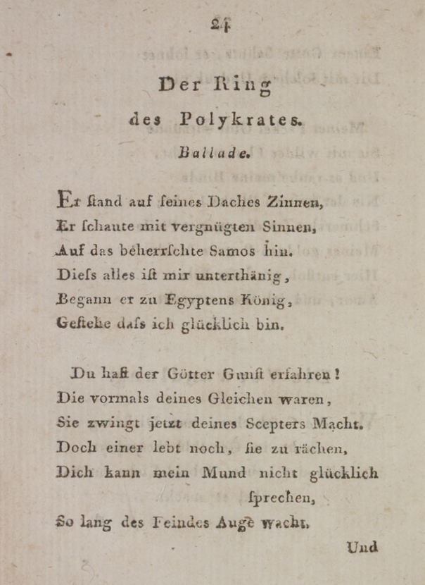 Beginn der Ballade Der Ring des Polykrates von Friedrich Schiller aus Musen-Almanach für das Jahr 1798, Tübingen 1798, S. 24 (erschienen bereits 1797), Ausschnitt